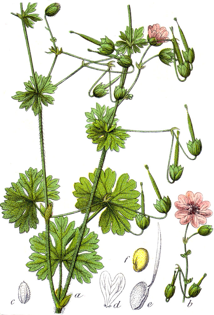 Geranium pyrenaicum Burm.f. Original Caption Pyrenäen-Geranium, Geranium pyrenaicum